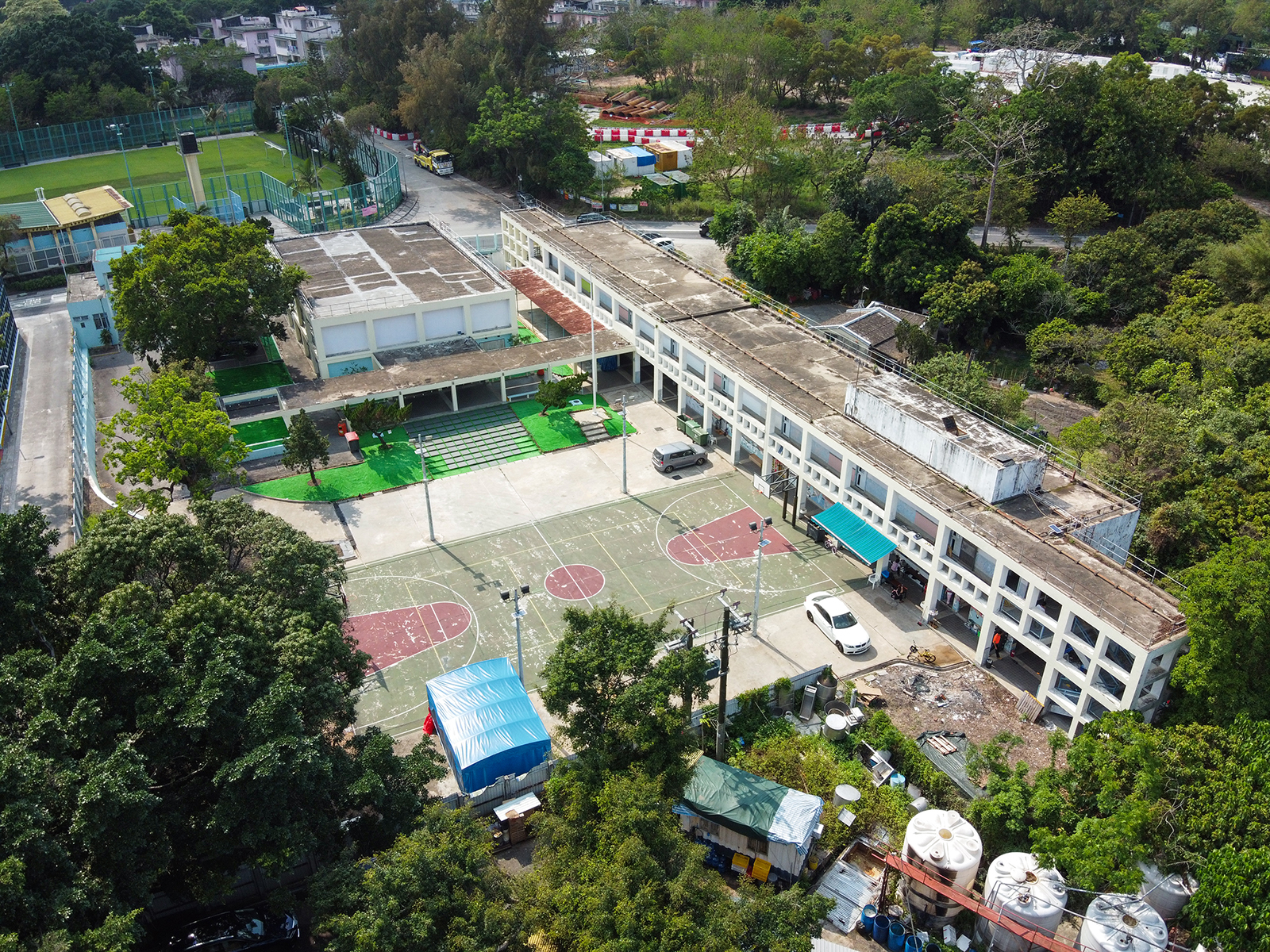 Oi Wah School, Kwu Tung